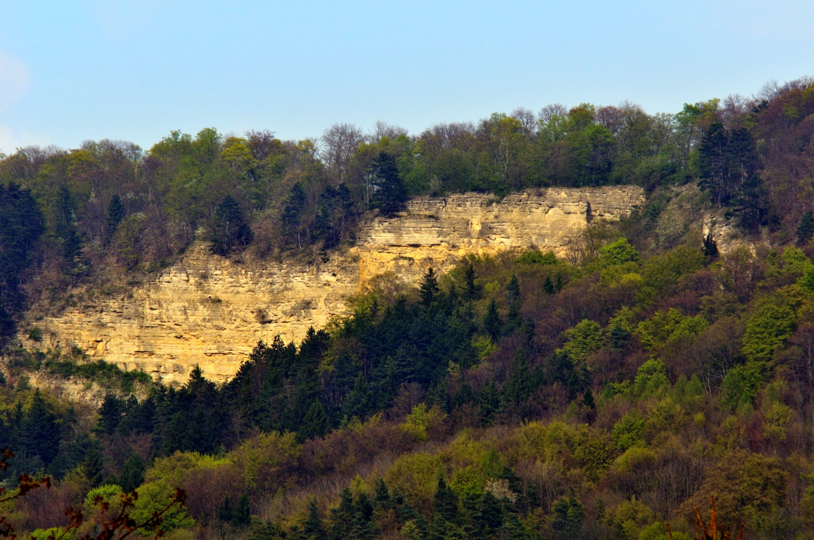 Plessefelsen